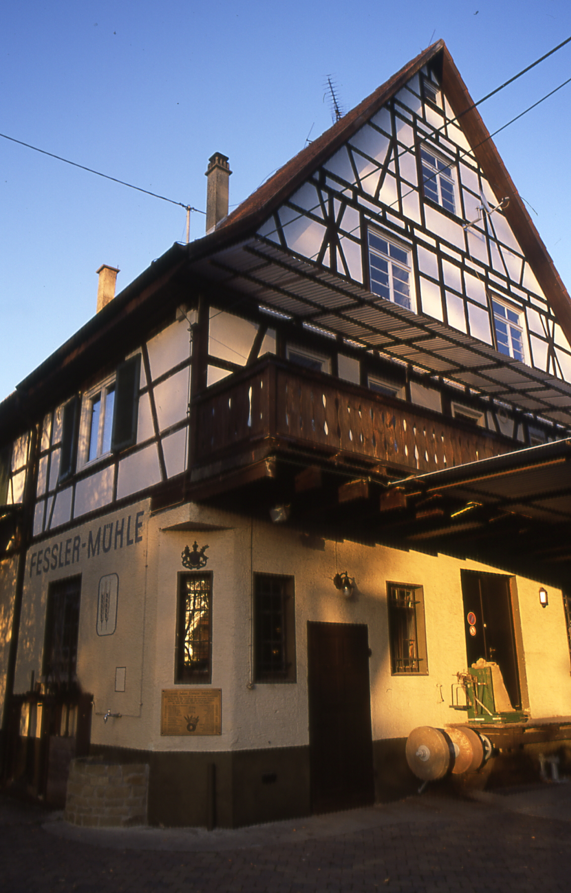 Fessler Mühle in Sersheim Quelle: Bild selbst erstellt Datum 14. Januar 2010 Autor: Manuela Berner